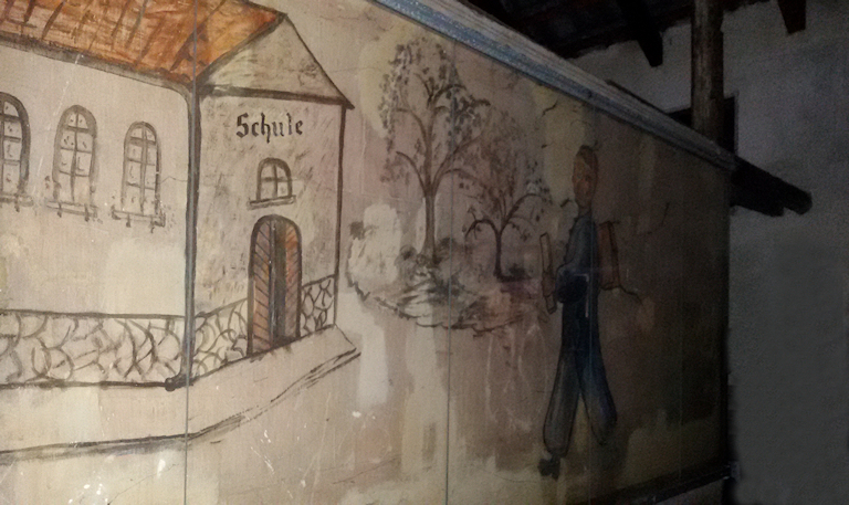 Baracca di prigionia per bambini